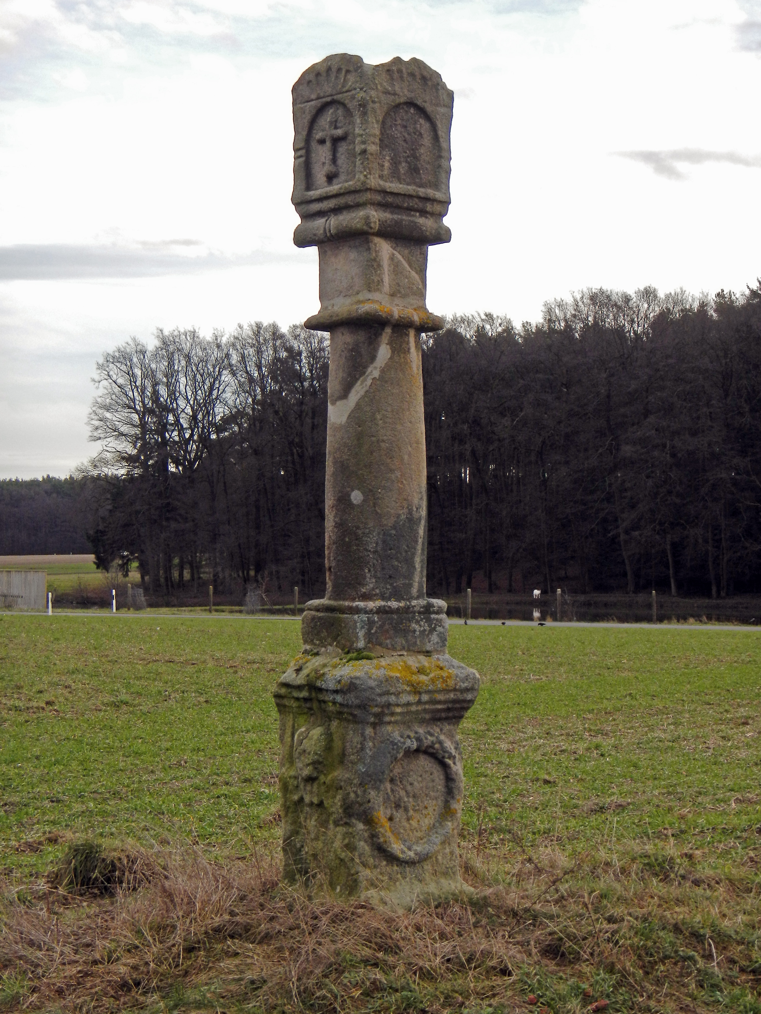 Martersäule, 17./18. Jahrhundert in Untermembach (Gemeinde Heßdorf) im Landkreis Erlangen-Höchstadt.